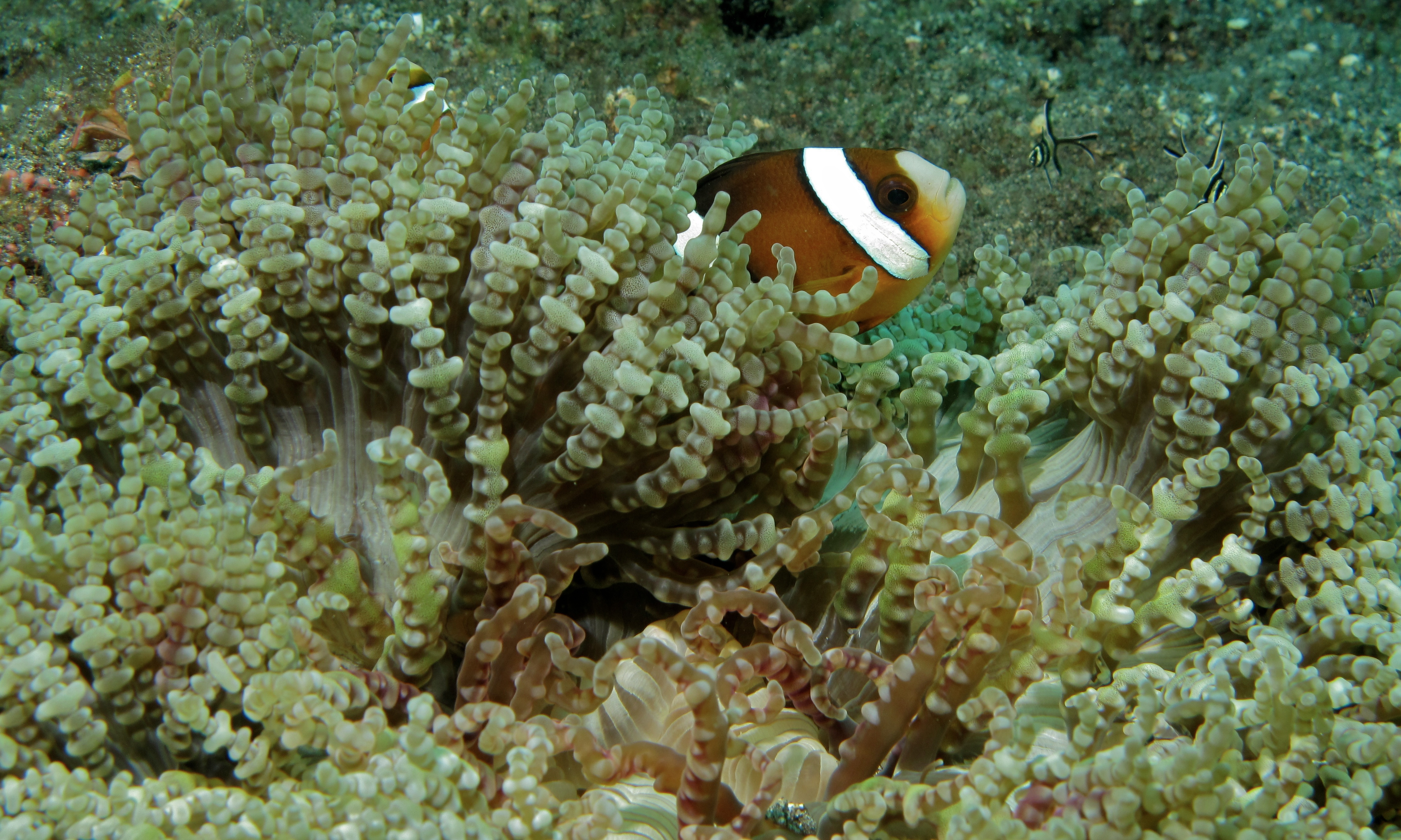 Nudi Retreat, Lembeh Strait, Sulawesi, INDONESIA